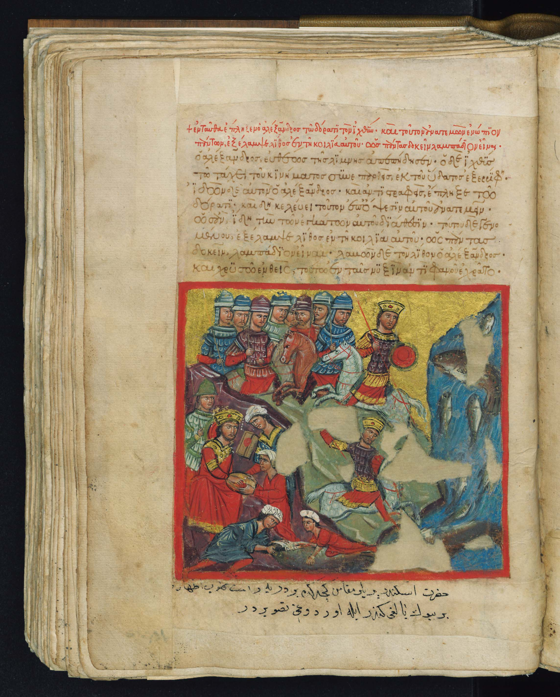 Φυλλάδα του Μεγαλέξανδρου, σελίδα από σωζόμενο αντίτυπο